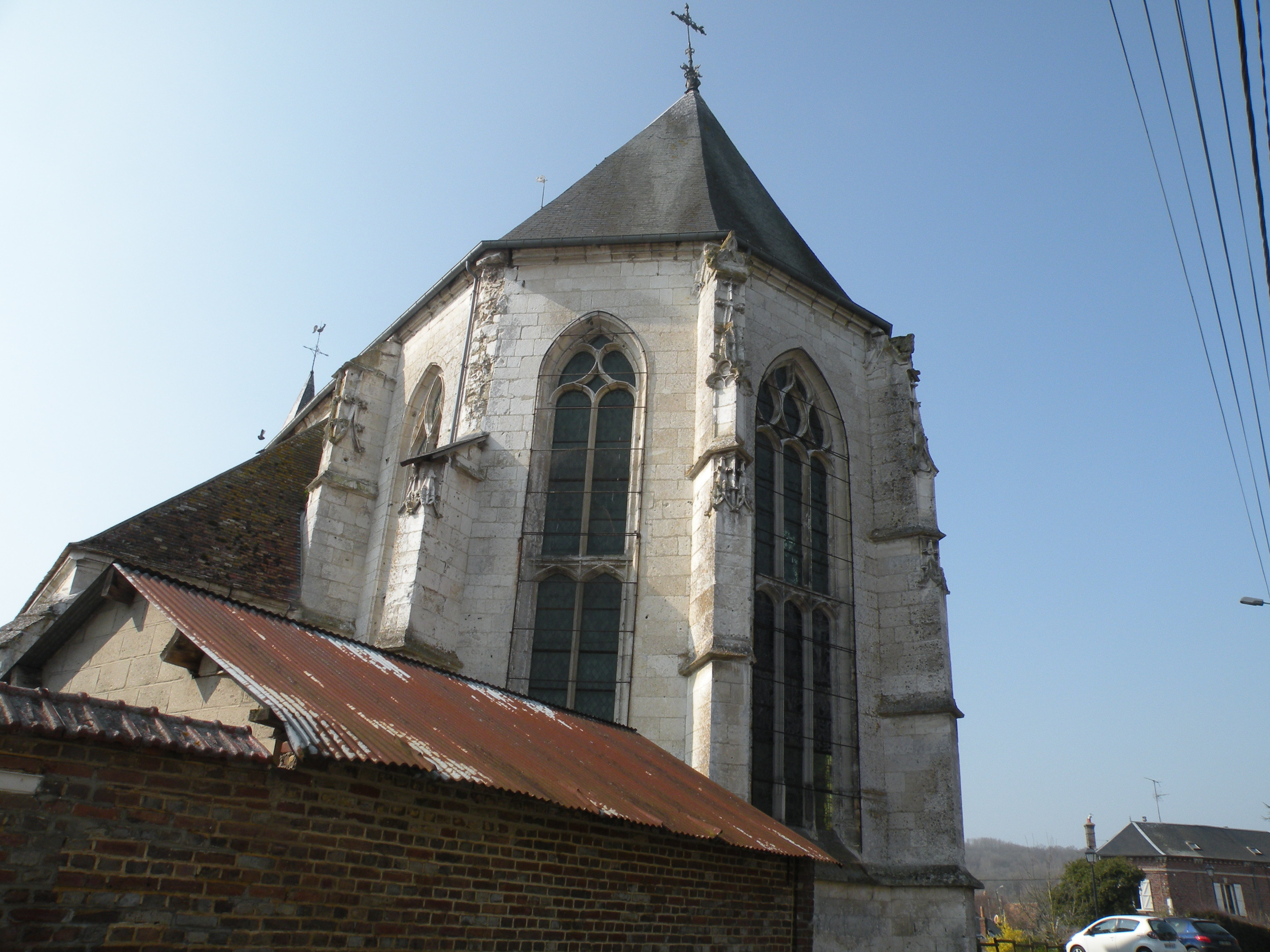 Église Saint-Denis d'Hodenc-en-Bray